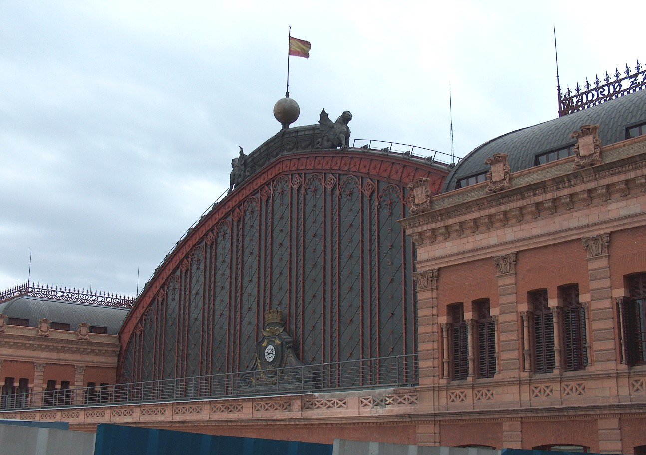 Estação da Atocha. Estação da Atocha em Madrid, Espanha.